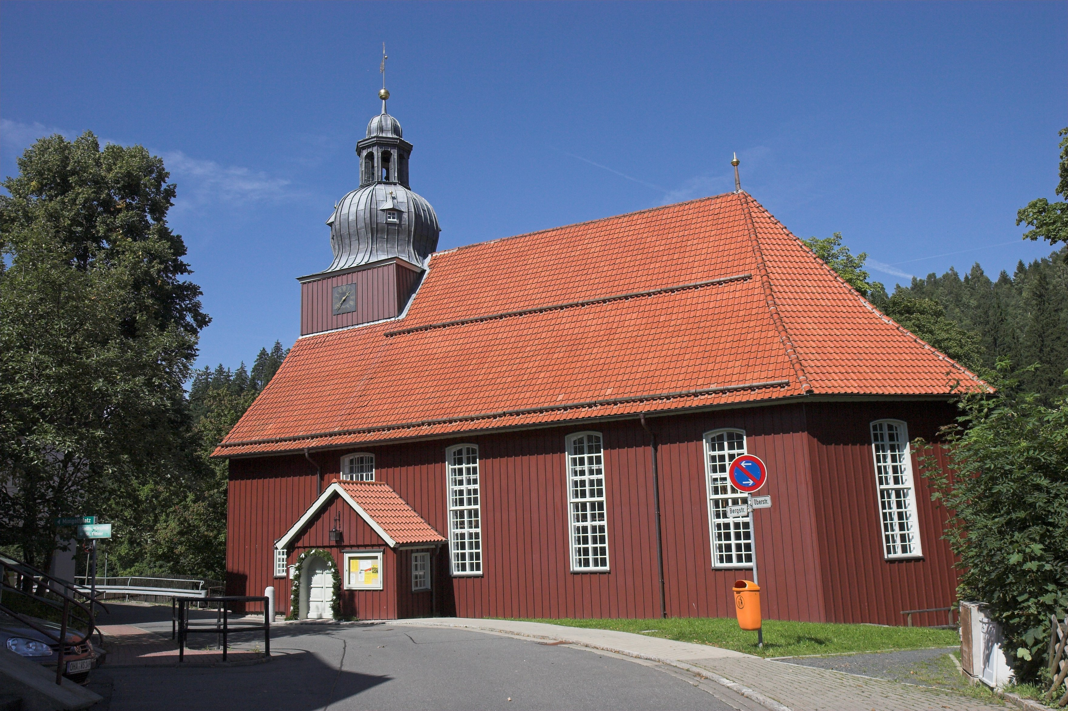 Holzkirche St. Nikolai in Altenau